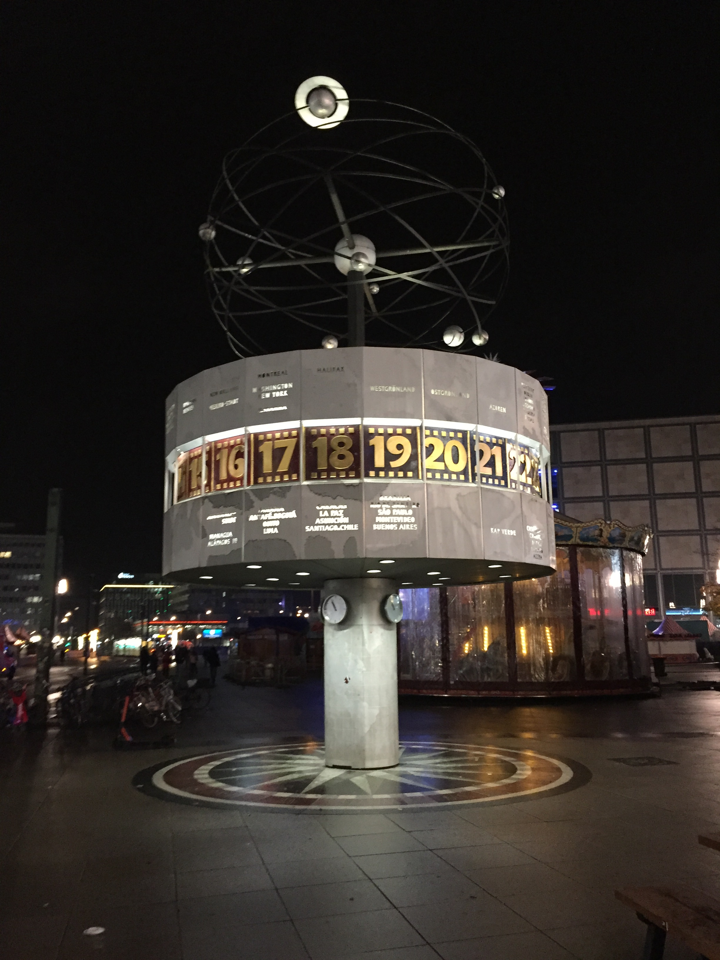 Weltzeituhr Berlin nachts